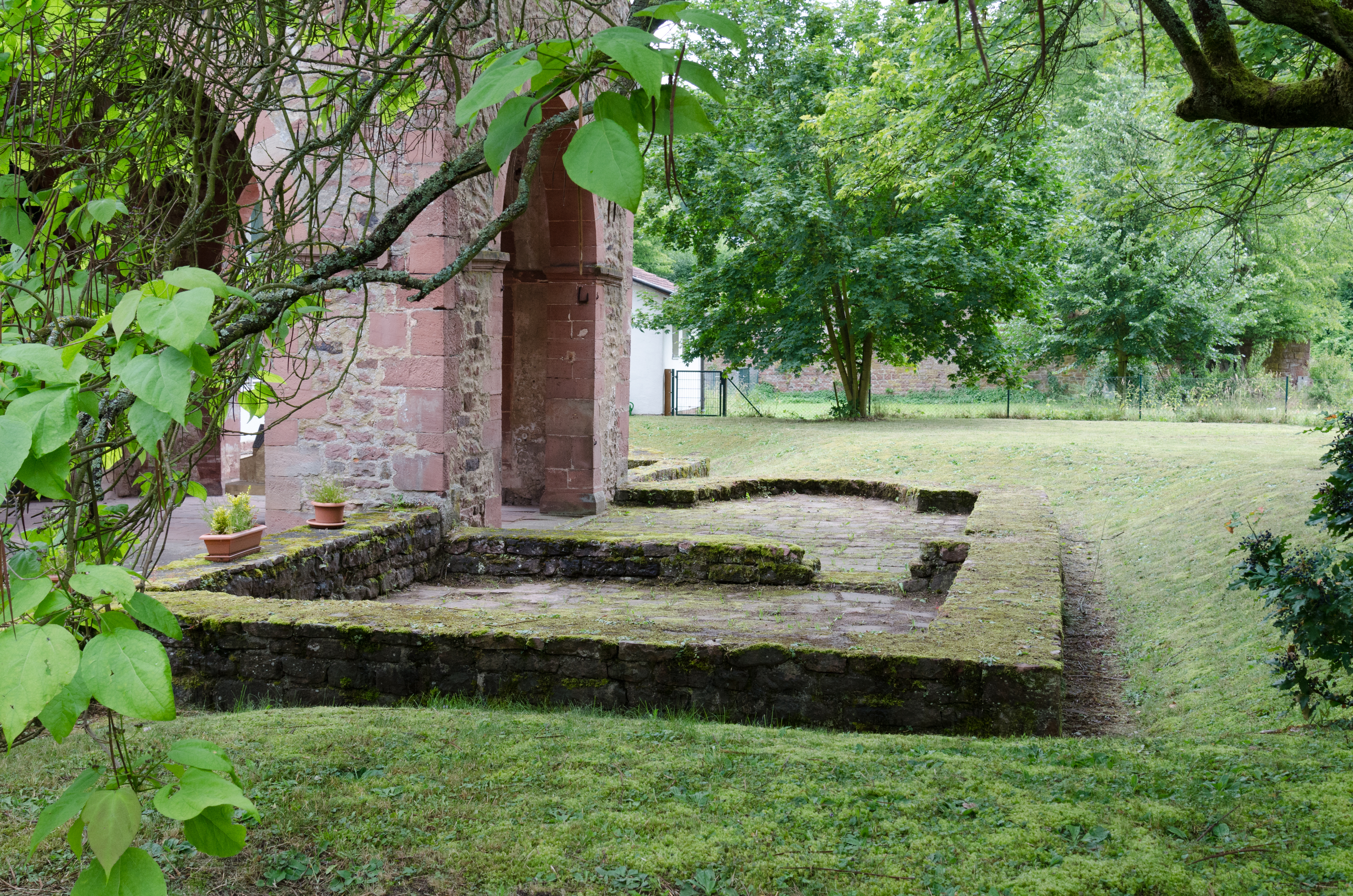 Neustadt am Main, Ehem. Kapelle St. Peter und Paul